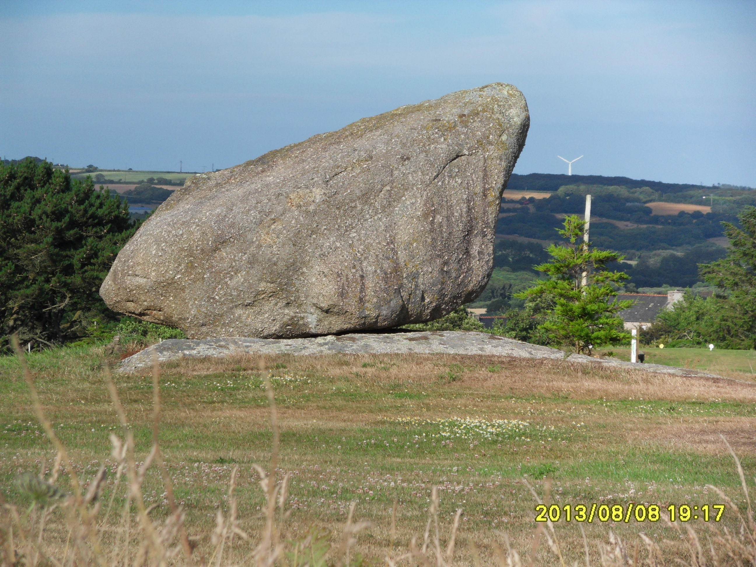 Menhir dans le golf de Plouarzel